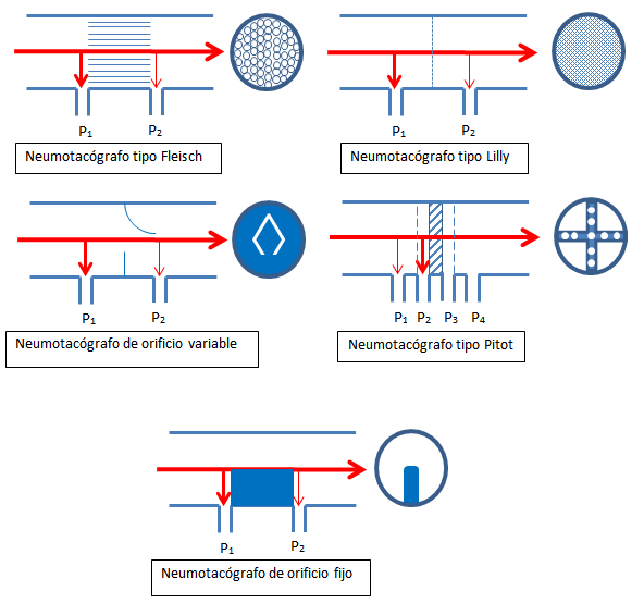 Diferentes tipos de Neumotacógrafos